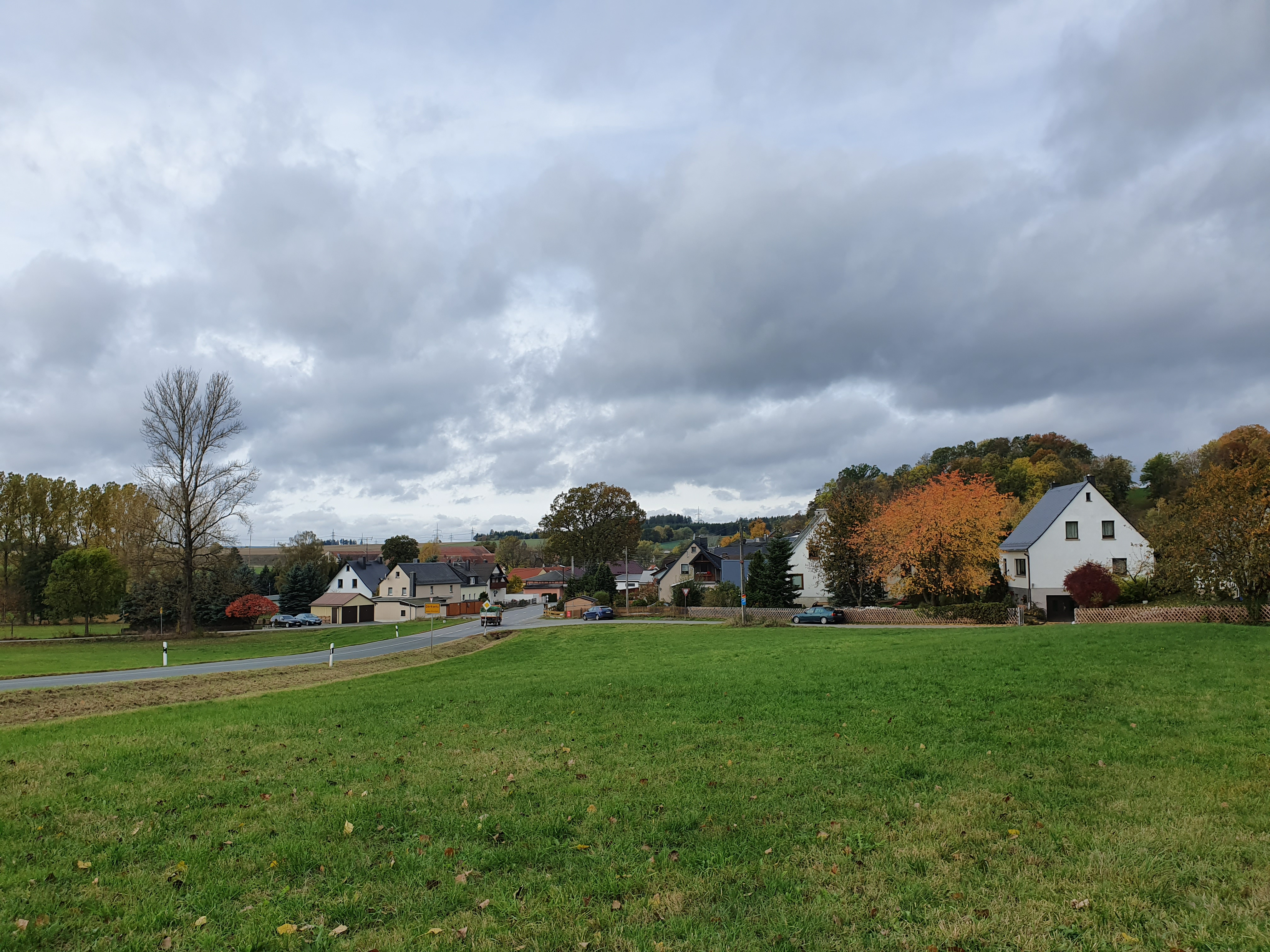 Blick von Osten auf Görkwitz in Thüringen